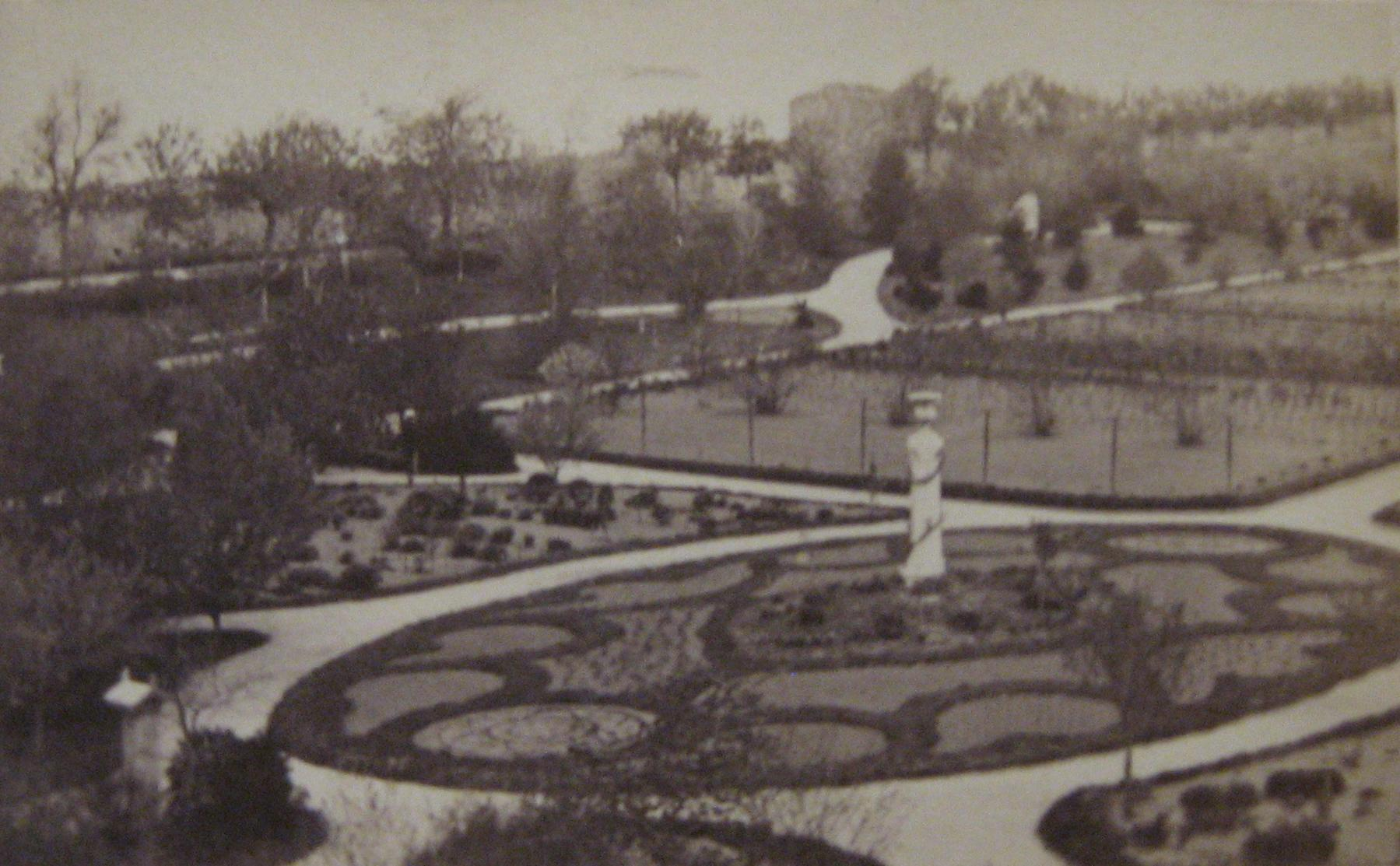 Botaniska trädgården i Visby, enligt påskrift 1870. Visitkortsfotografi